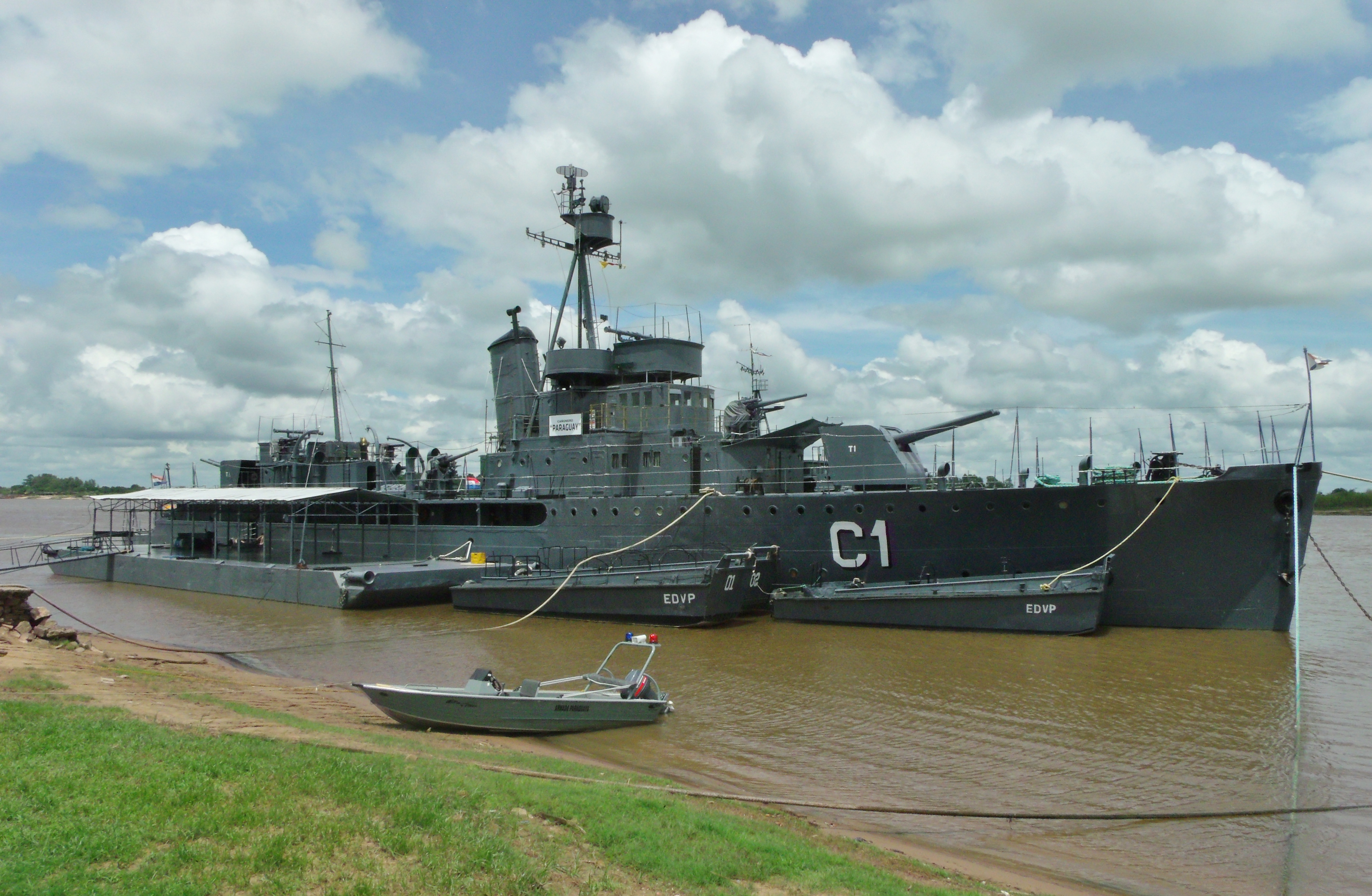 Cañonero ARP C-1 "Paraguay"